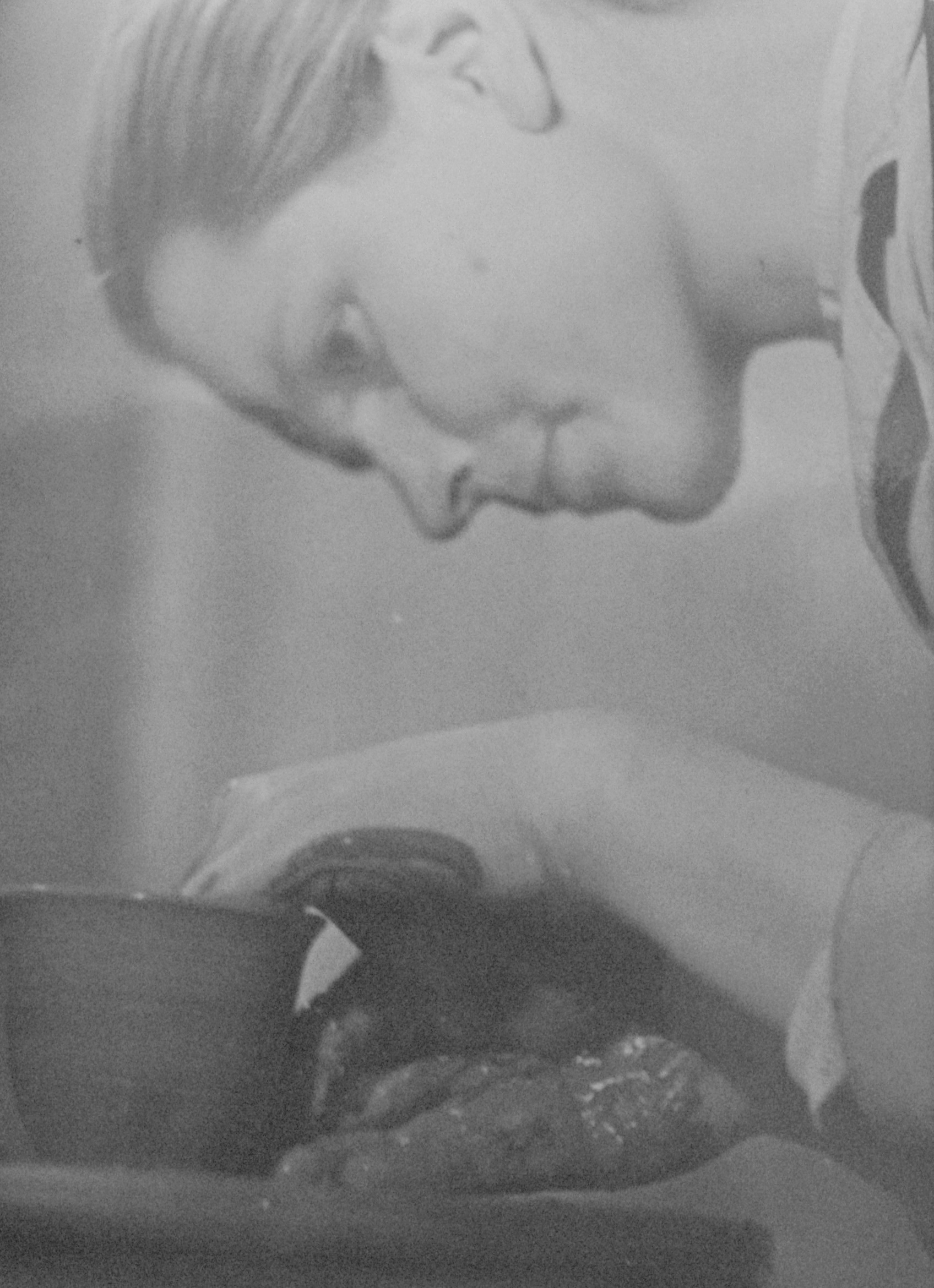 Keramiķe Marija Ozoliņa izgatavojot traukus